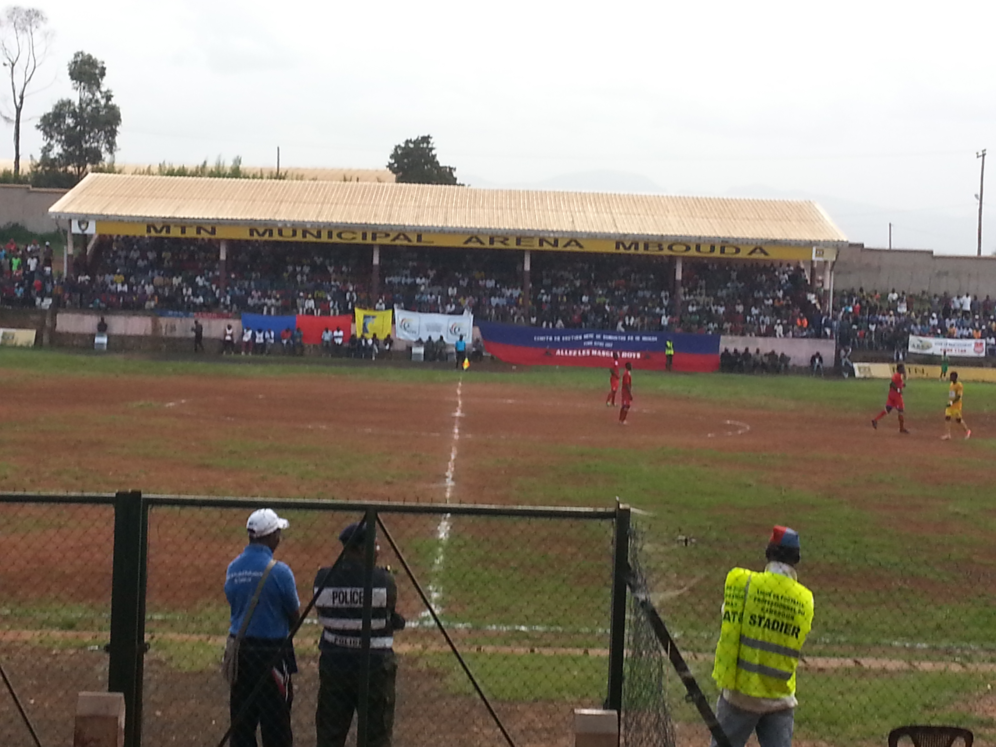 Un match de football de Bamboutos FC au stade municipal de Mbouda en mai 2015